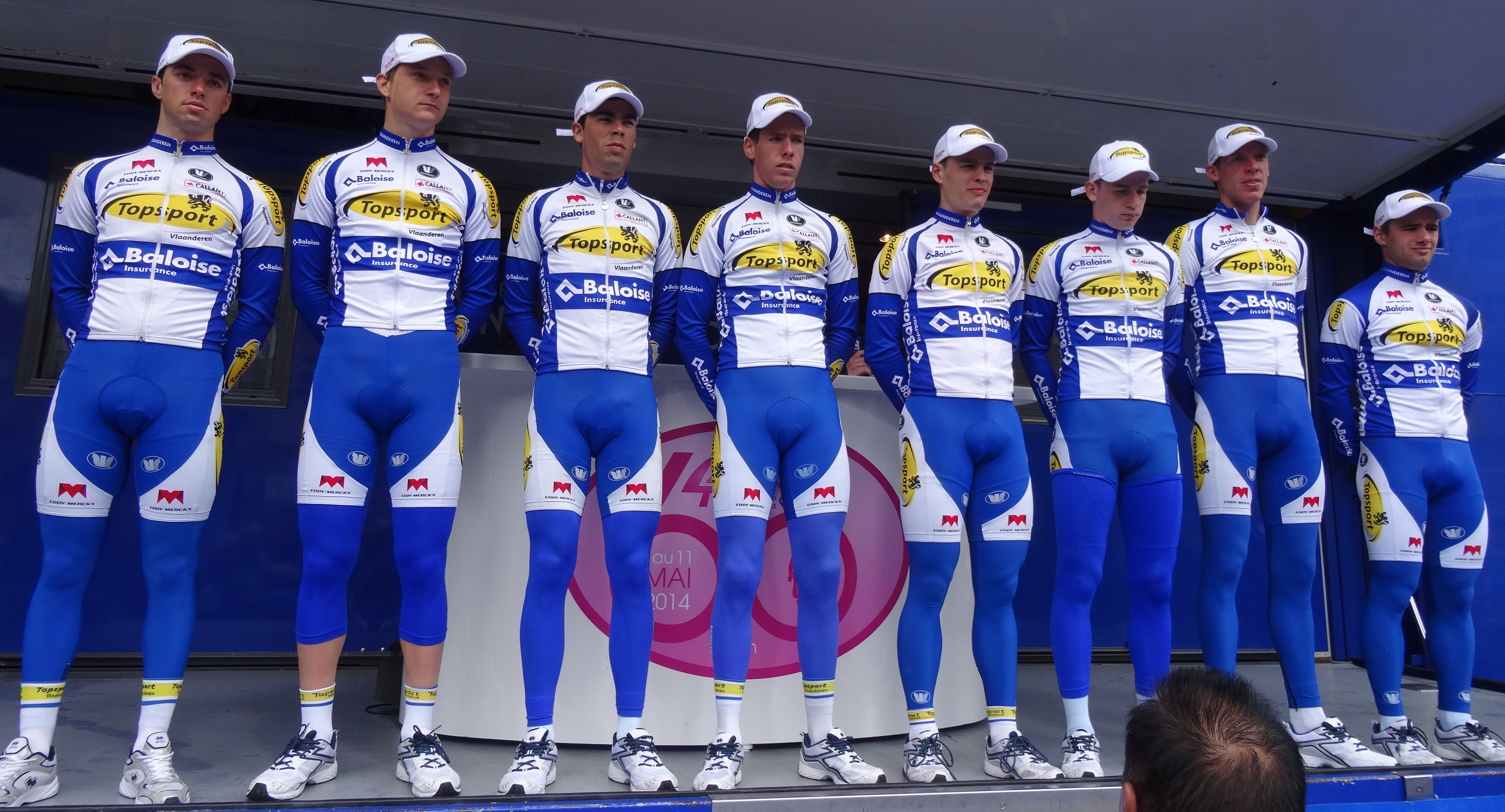 Reportage photographique réalisé le mercredi 7 mai 2014 au départ de la première étape de l'édition 2014 des Quatre jours de Dunkerque à Dunkerque, Nord, Nord-Pas-de-Calais, France. Depicted people: Tom Van Asbroeck, Jonas Rickaert, Pieter Jacobs, Kenneth Vanbilsen, Otto Vergaerde, Stijn Steels, Tim Declercq and Victor Campenaerts Depicted team: Topsport Vlaanderen-Baloise